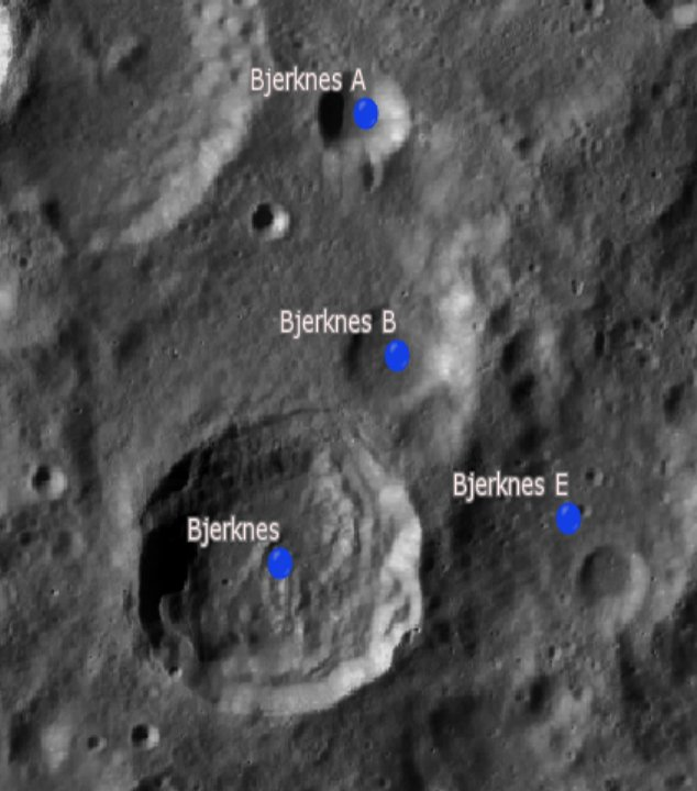 Cráter lunar Bjerknes. Cráteres satélite. (Imagen LRO)